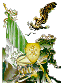 emblema del himno del colegio militar